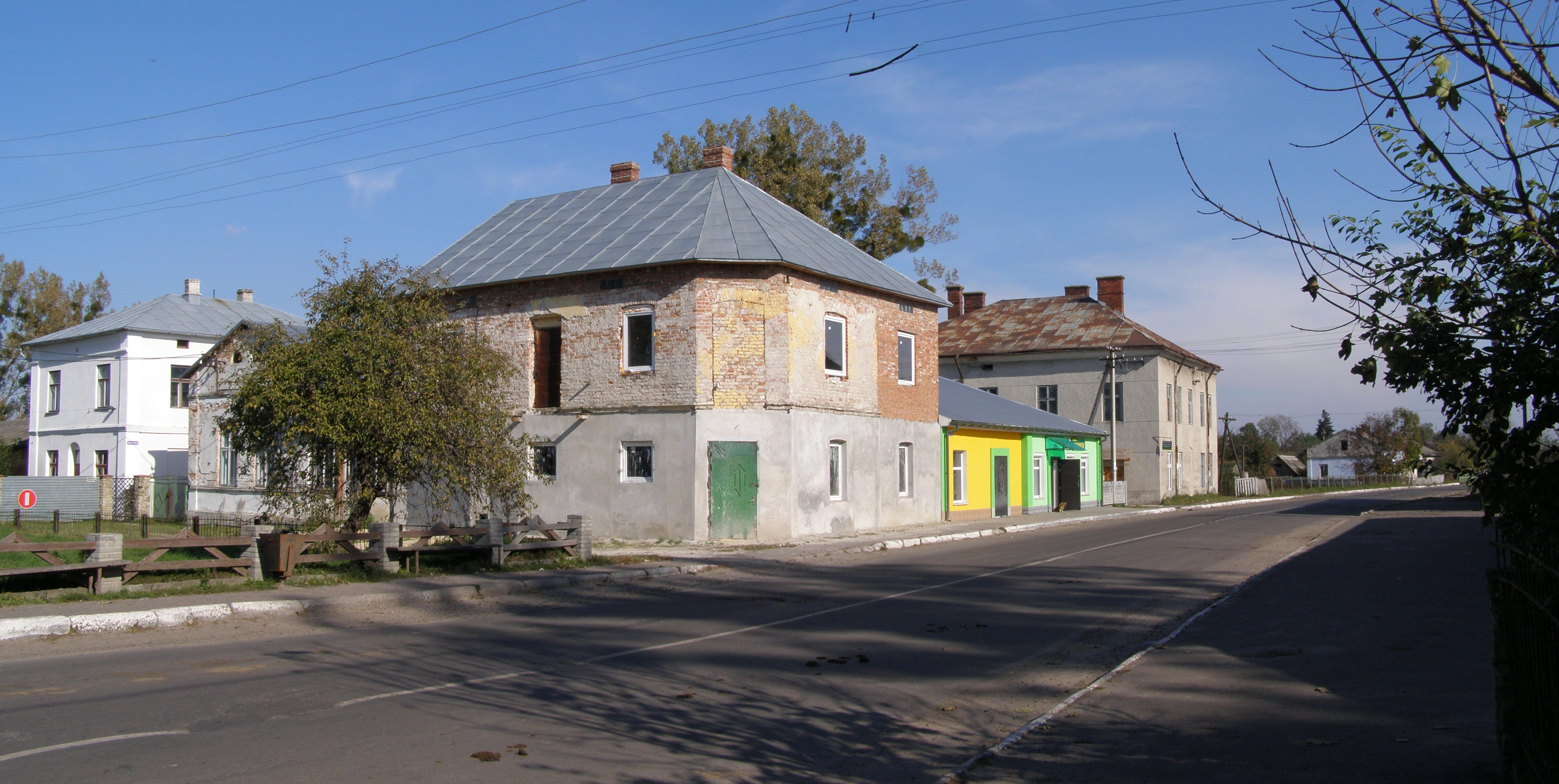 Залишки історичної забудови в центрі села